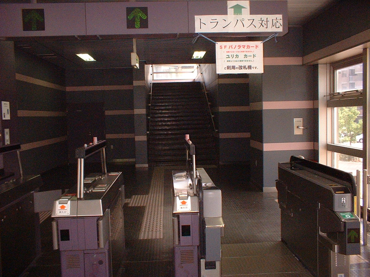 桃花台線の改札口。一台だけトランパスカード対応の自動改札が導入されており、それ以外は非対応である。（桃花台東駅） 平成18年8月29日にHoutengが撮影。